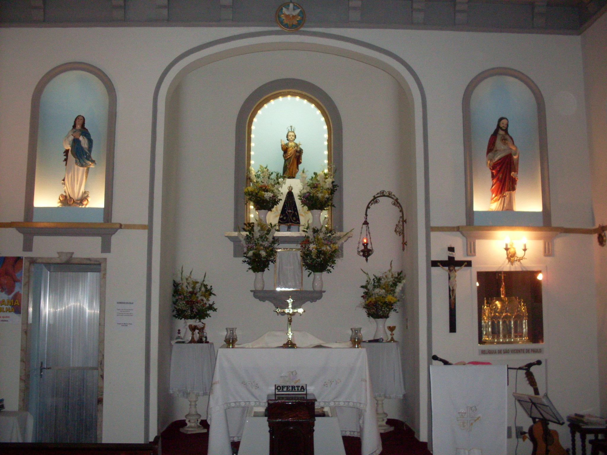 Altar da Capela do Menino Deus